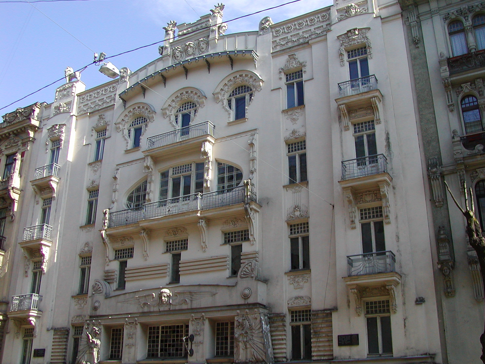 Building at Alberta iela 4, architect Mikhail Eisenstein